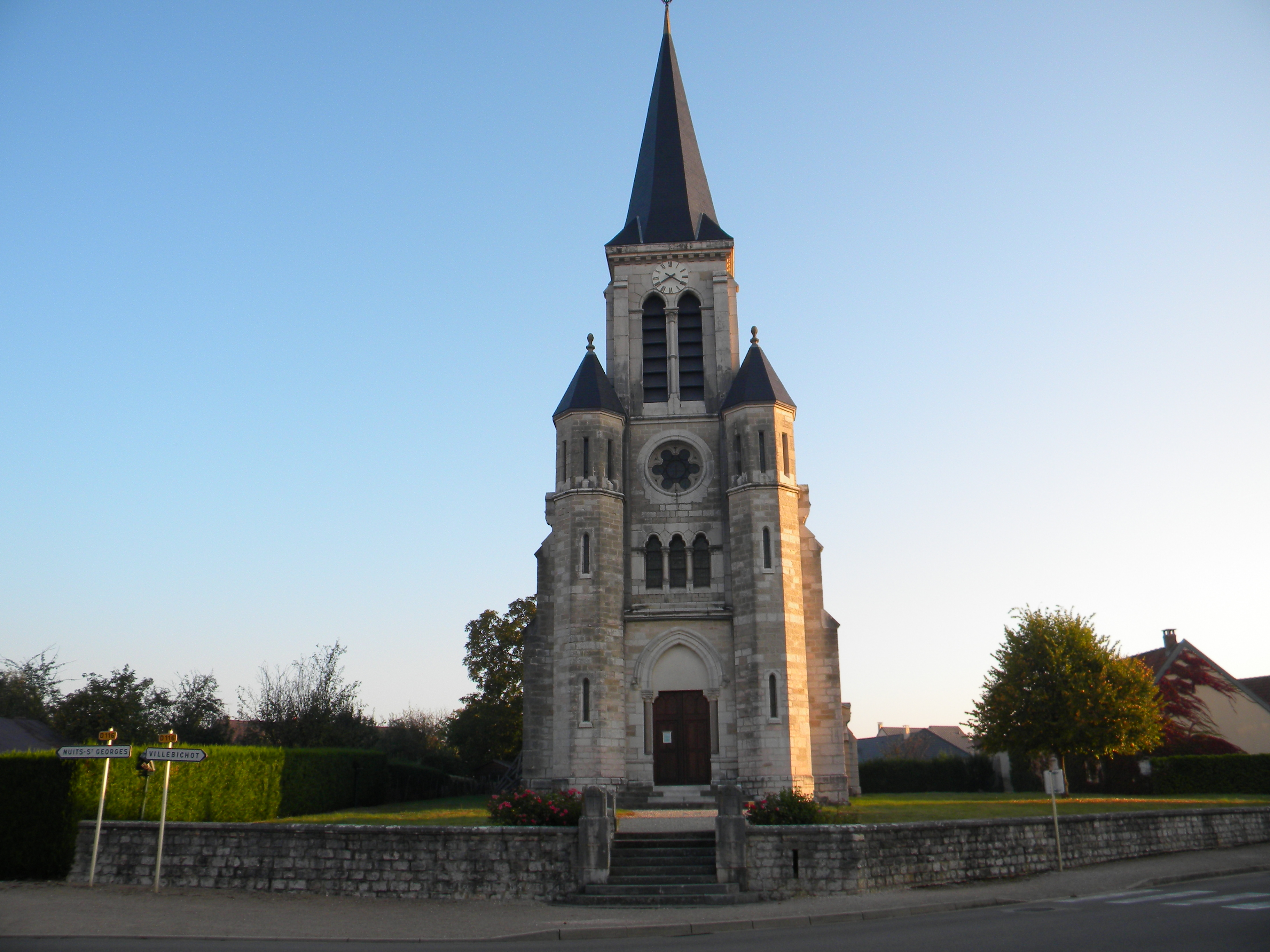 Eglise de Boncourt-le-Bois